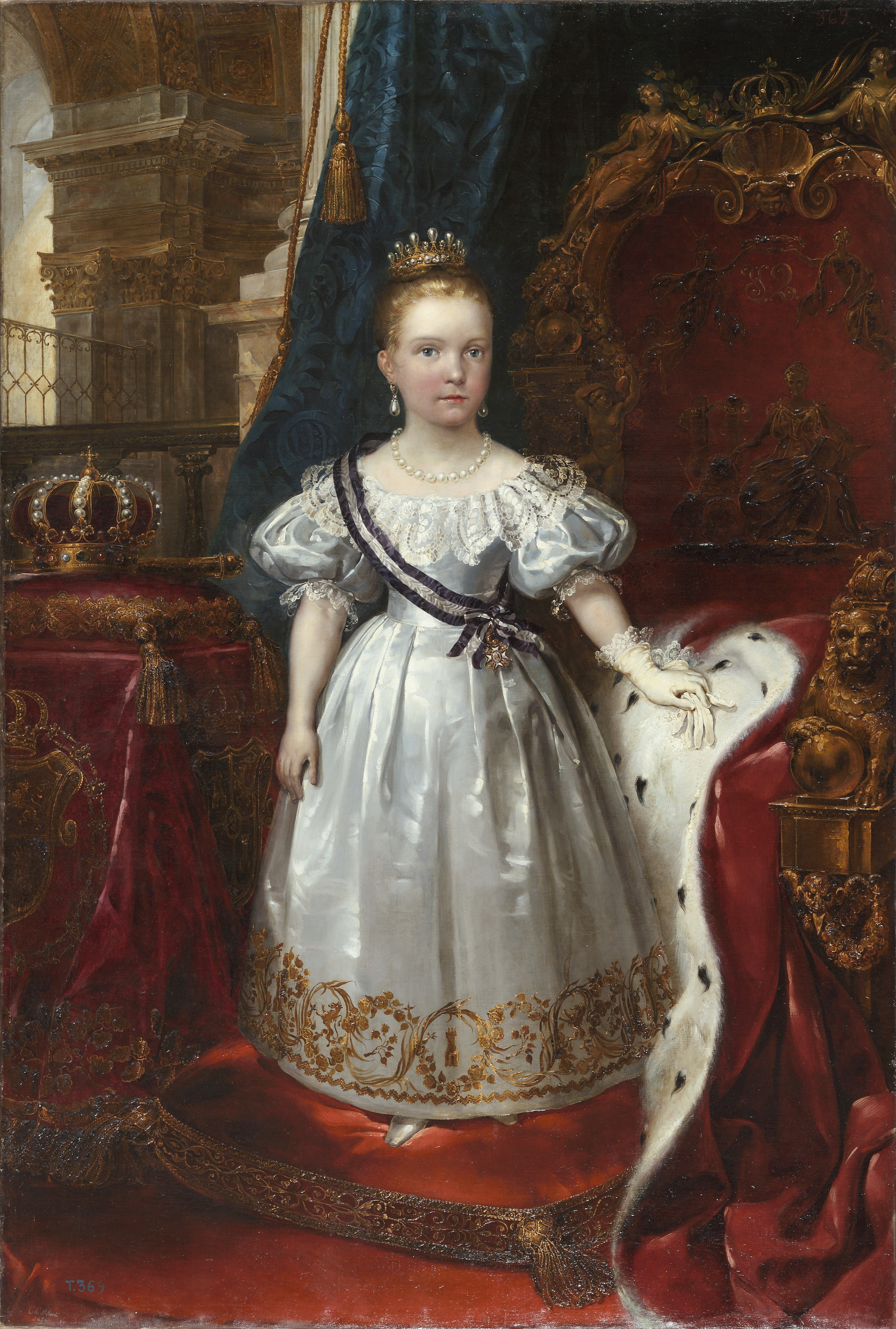 Retrato de la reina Isabel II de España (1830-1904), que fue hija del rey Fernando VII de España y de la reina María Cristina de Borbón-Dos Sicilias.